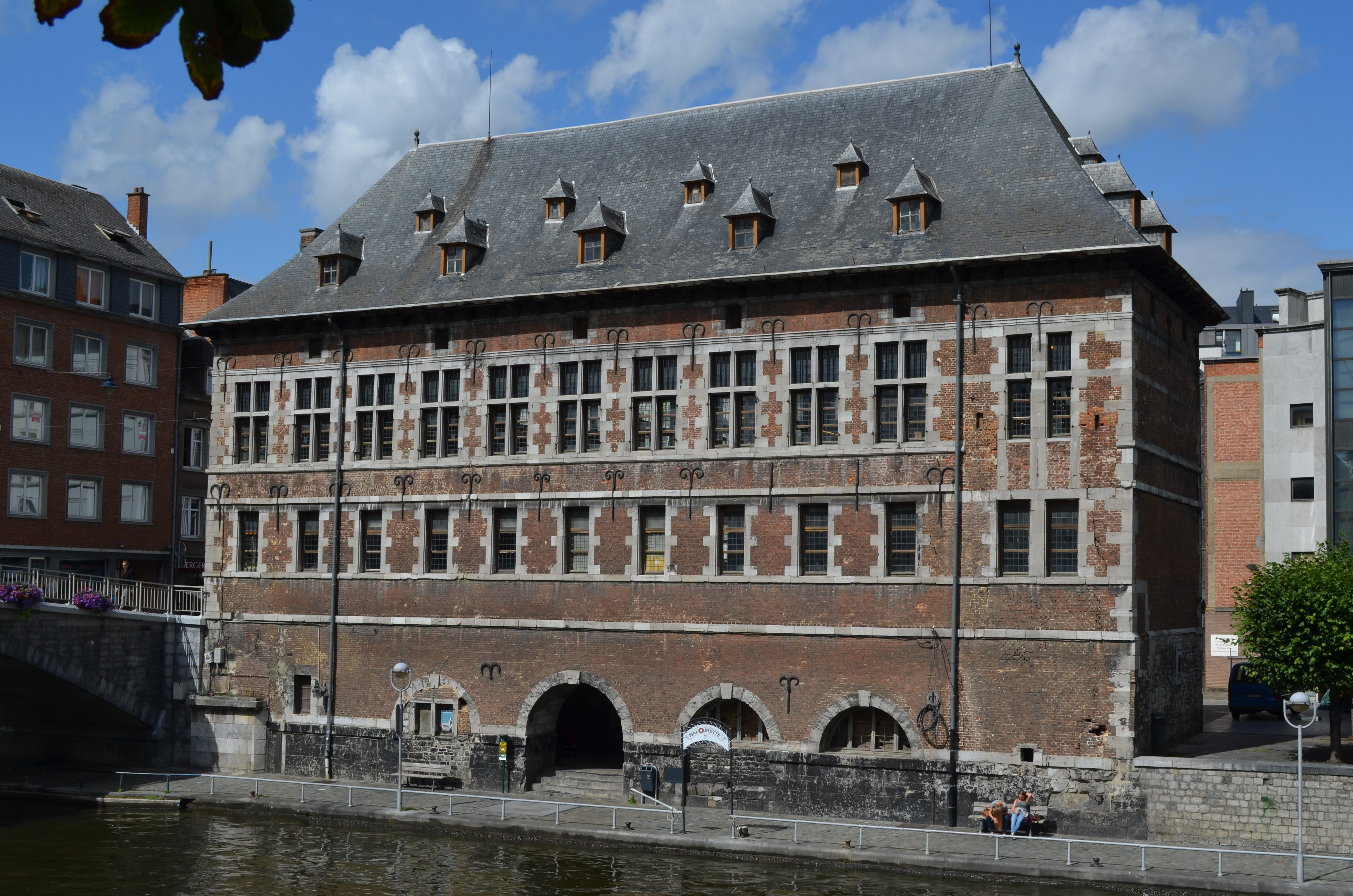 Namur (Belgique) - Halle al'Chair